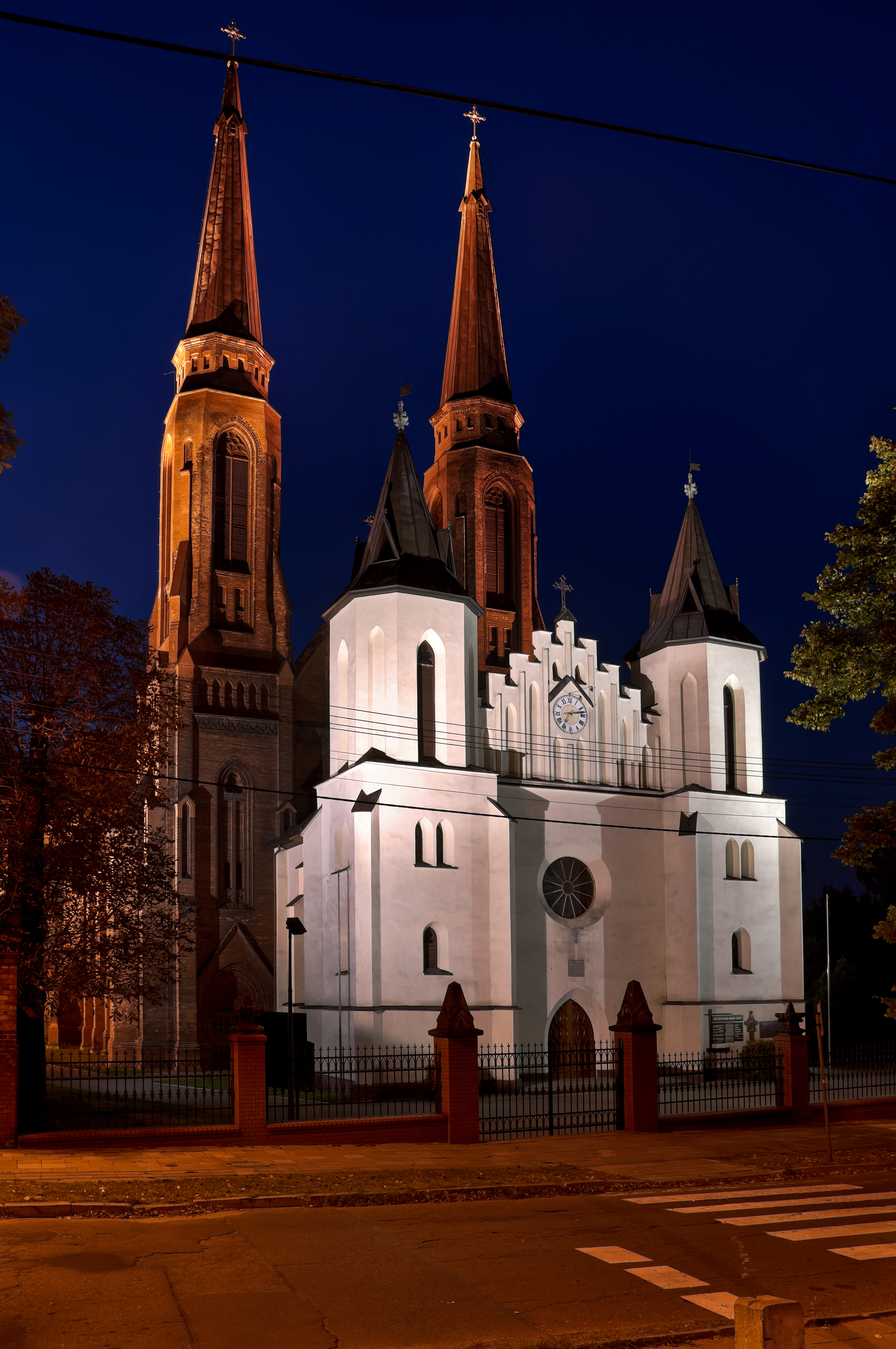 Kościół p.w. św. Joachima nocą, Sosnowiec - A-18/60 z 23.02.1960 i A/166/06 z 11.01.2006